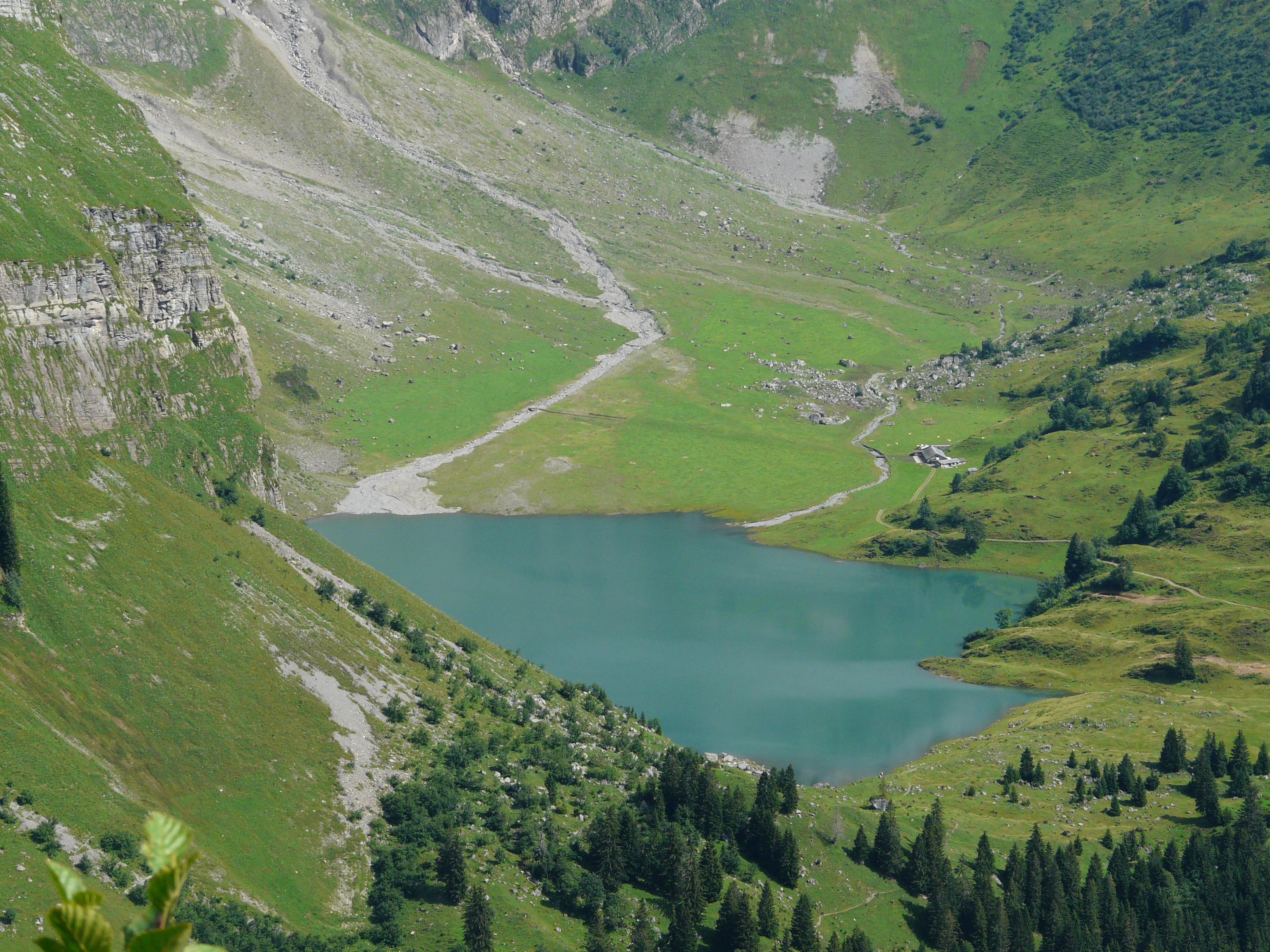 Oberblegisee